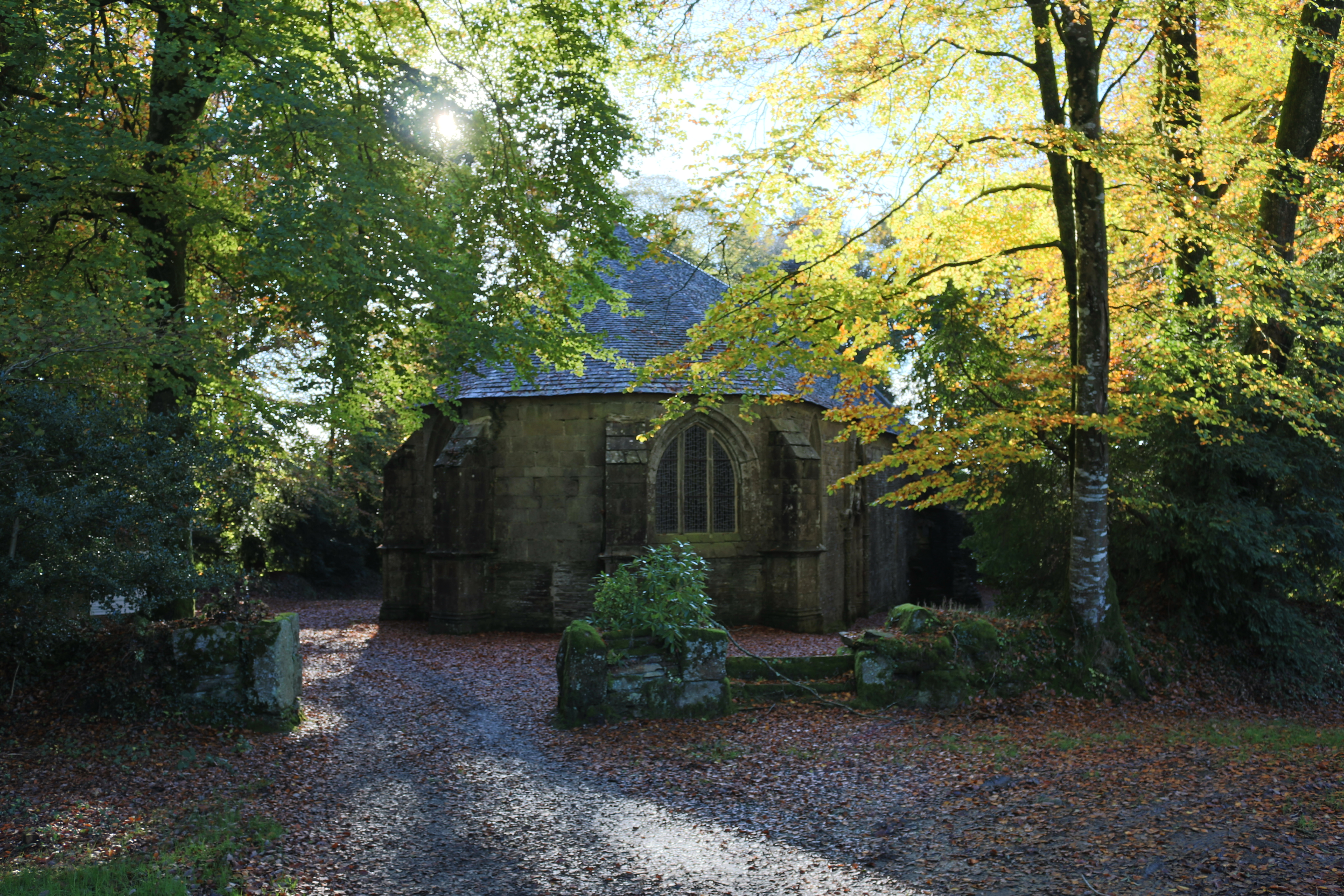 Vue du chevet de la chapelle de la Croix en Loqueffret, Finistère, Bretagne, FranceBrezhoneg: Ar penn-chantele ar chapel ar Groaz e kumun Lokeored, Penn-ar-Bed, Breizh. .